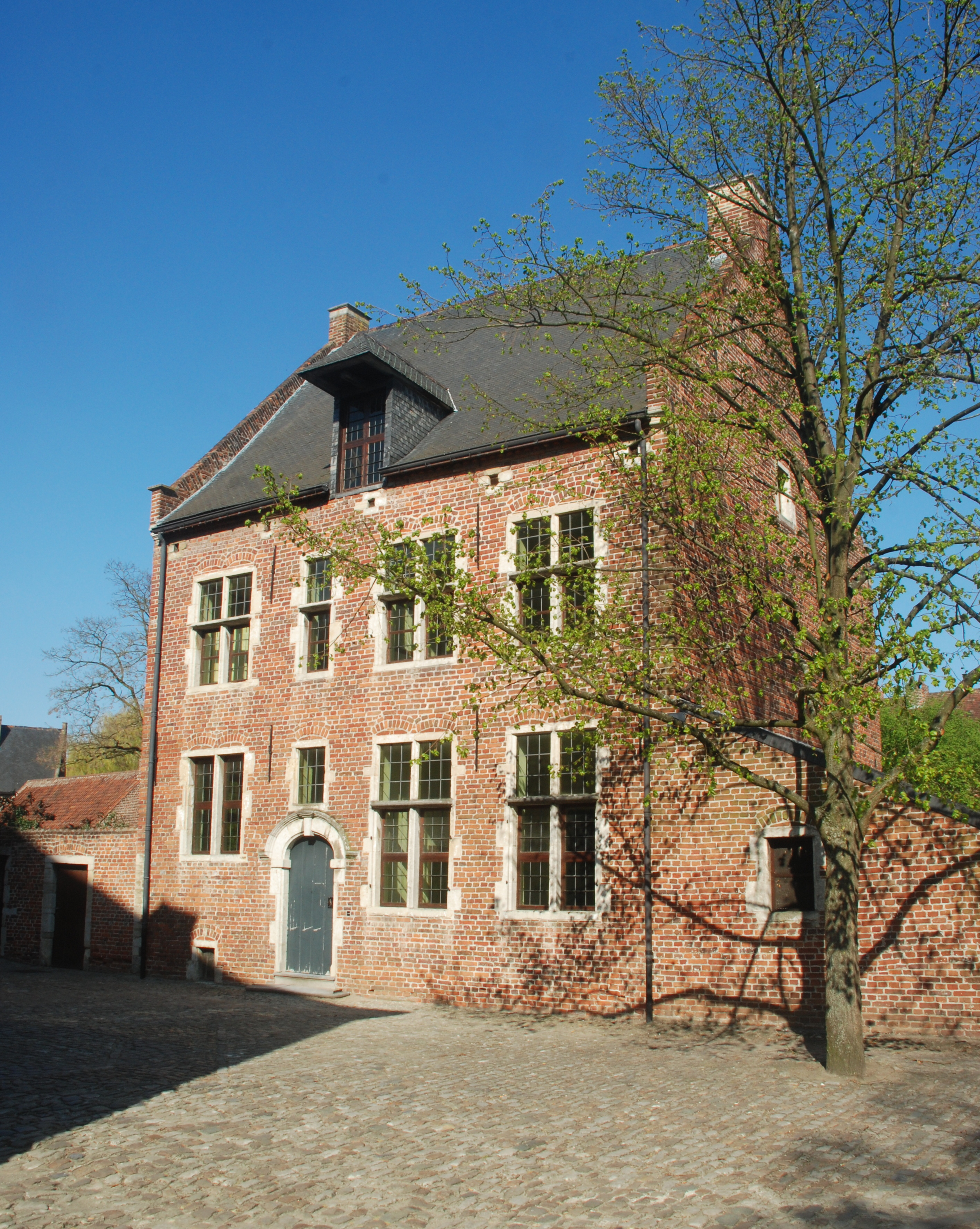 Belgium - Leuven - Groot Begijnhof